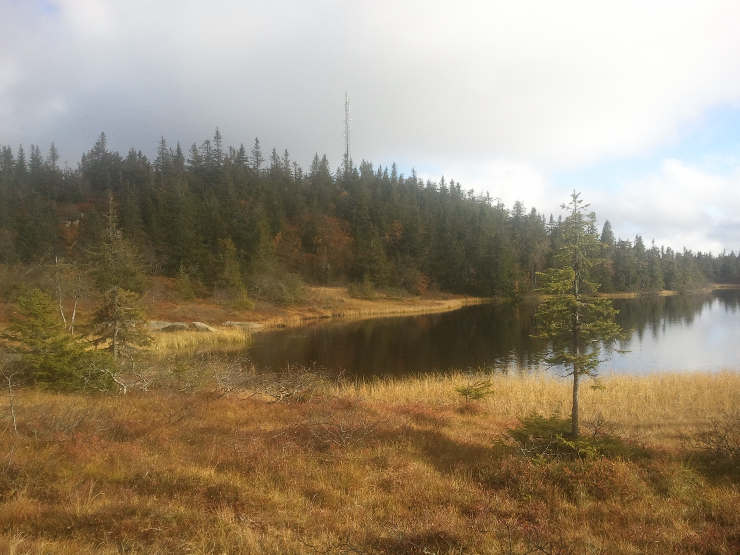 Torsæterkampen sett fra Raudsteinshytta. Raudsteinstjernet i forgrunnen.